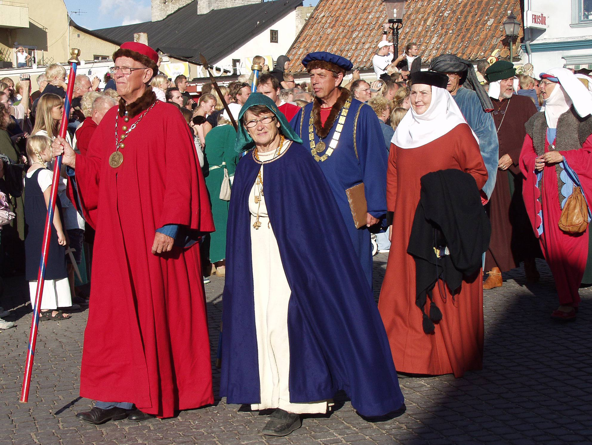 Gruppe mittelalterlich gekleideter Einwohner der gotländischen Stadt Visby anlässlich der Medeltidsveckan.